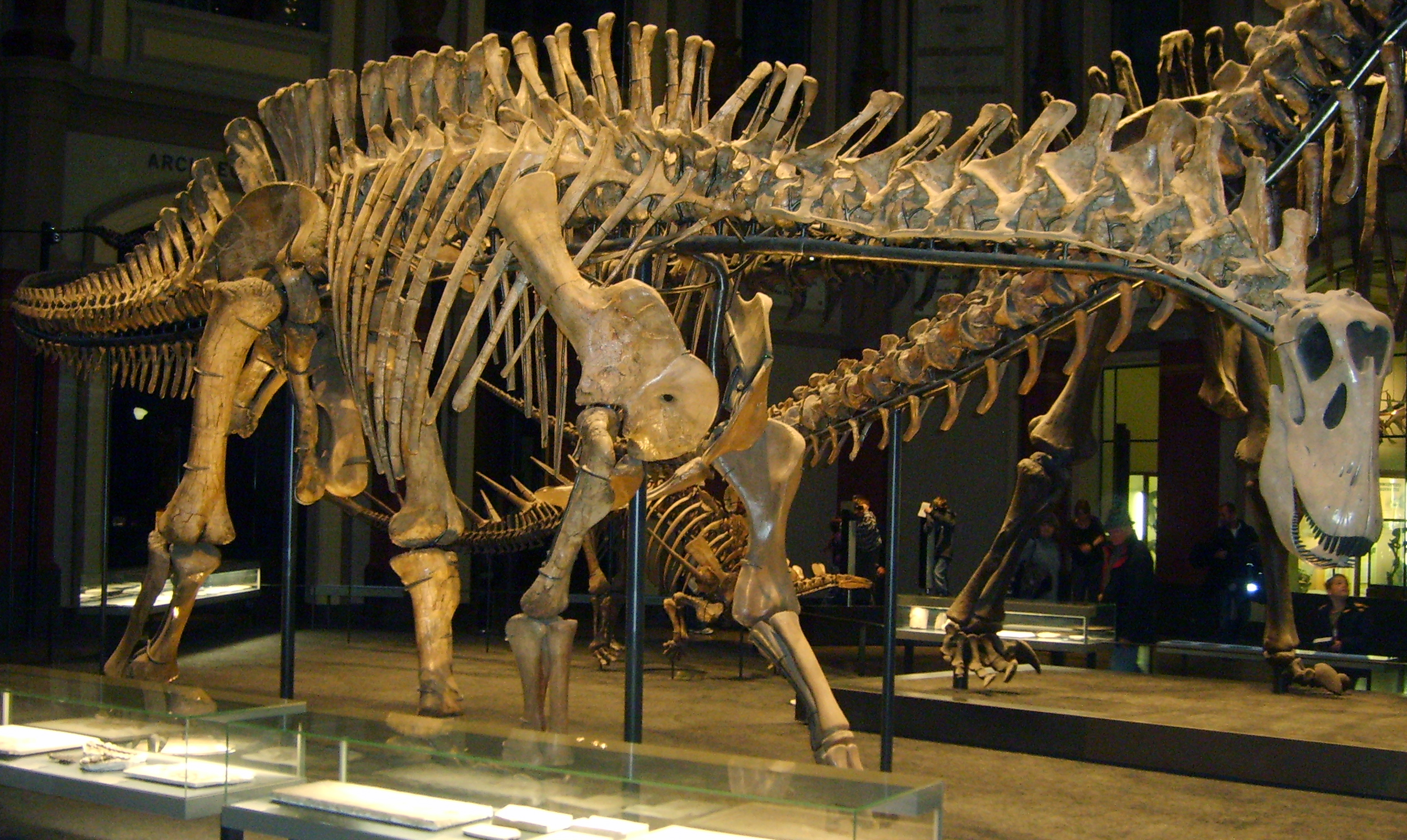 Dicraeosaurus skeleton at the Museum für Naturkunde, Berlin.